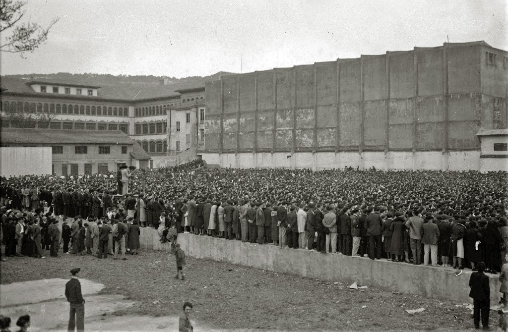 1933. urtean EAJk Donostian Atotxako Maitea pilotaleku zaharrean antolaturiko Aberri Eguneko jendetza. Argazkiaren originala Kutxa Fototekak kudeatzen du eta webgunean eta atarian erakusten du